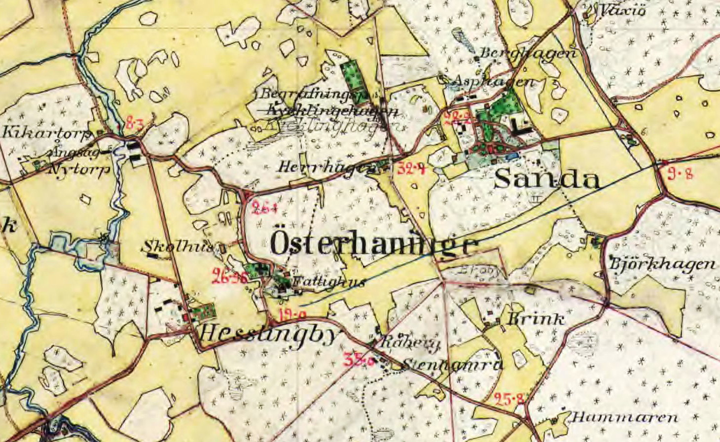 Hesslingby och Sanda gårdar med Österhaninge kyrka på Häradsekonomiska kartan från 1901